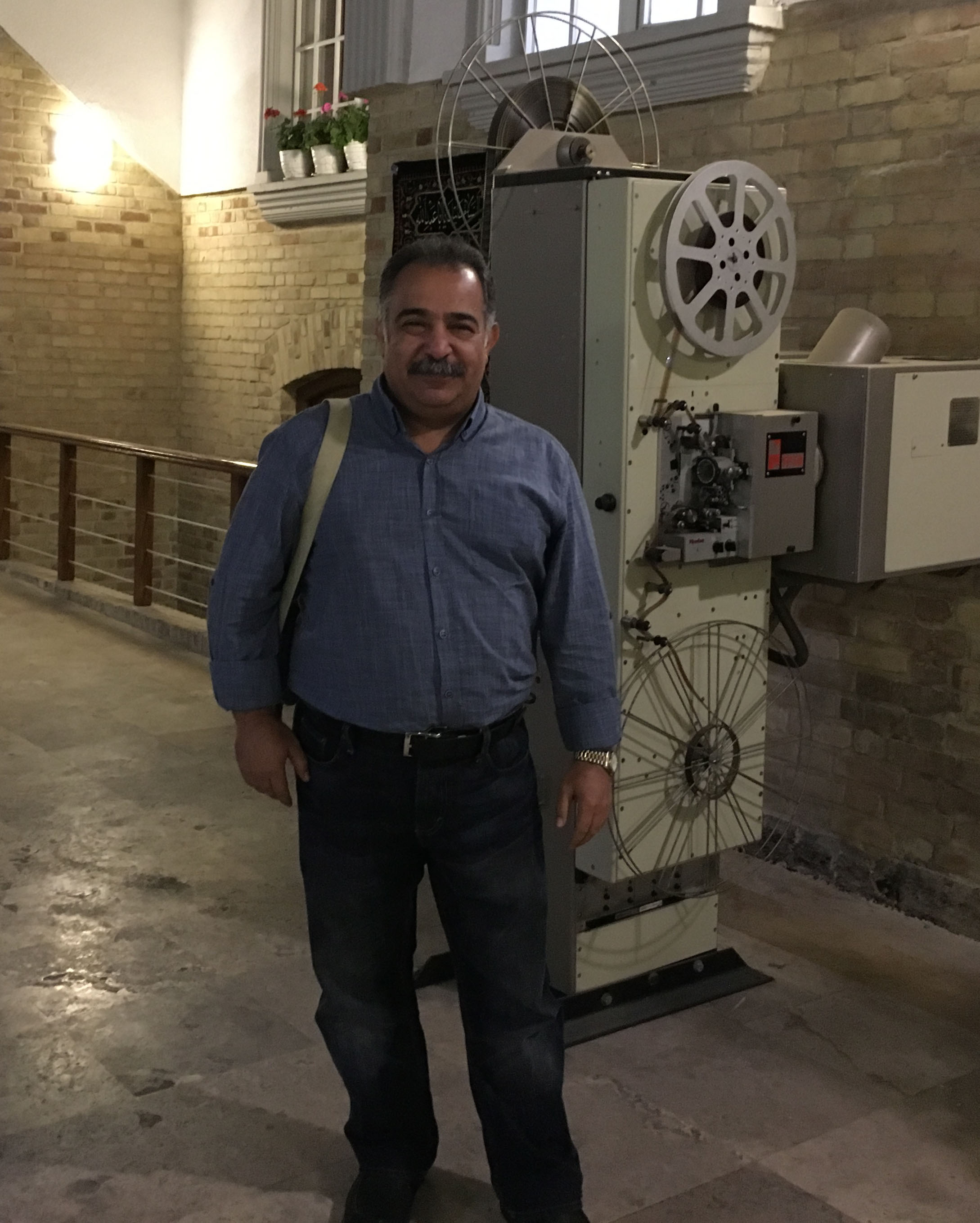 محمود منتظم صدیقی (موسیقیدان) مجمع عمومی کانون آهنگسازان سینمای ایران ۱۴ آبان ۱۳۹۶ خانه سینمای ایران